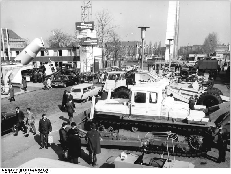 Leipzig, Frühjahrsmesse, Freigelände, Planierraupe Zentralbild Thieme 15.3.71 Leipziger Frühjahrsmesse 1971. Das "gewichtigste" Exponat der sowjetischen Messekollektion ist diese 42 Tonnen schwere Planierraupe.